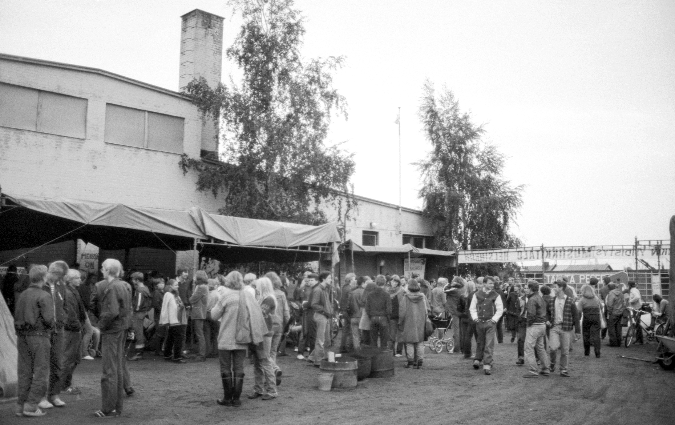 Nuorisoa vallatun Lepakkoluolan edustalla Helsingissä elokuussa 1979.